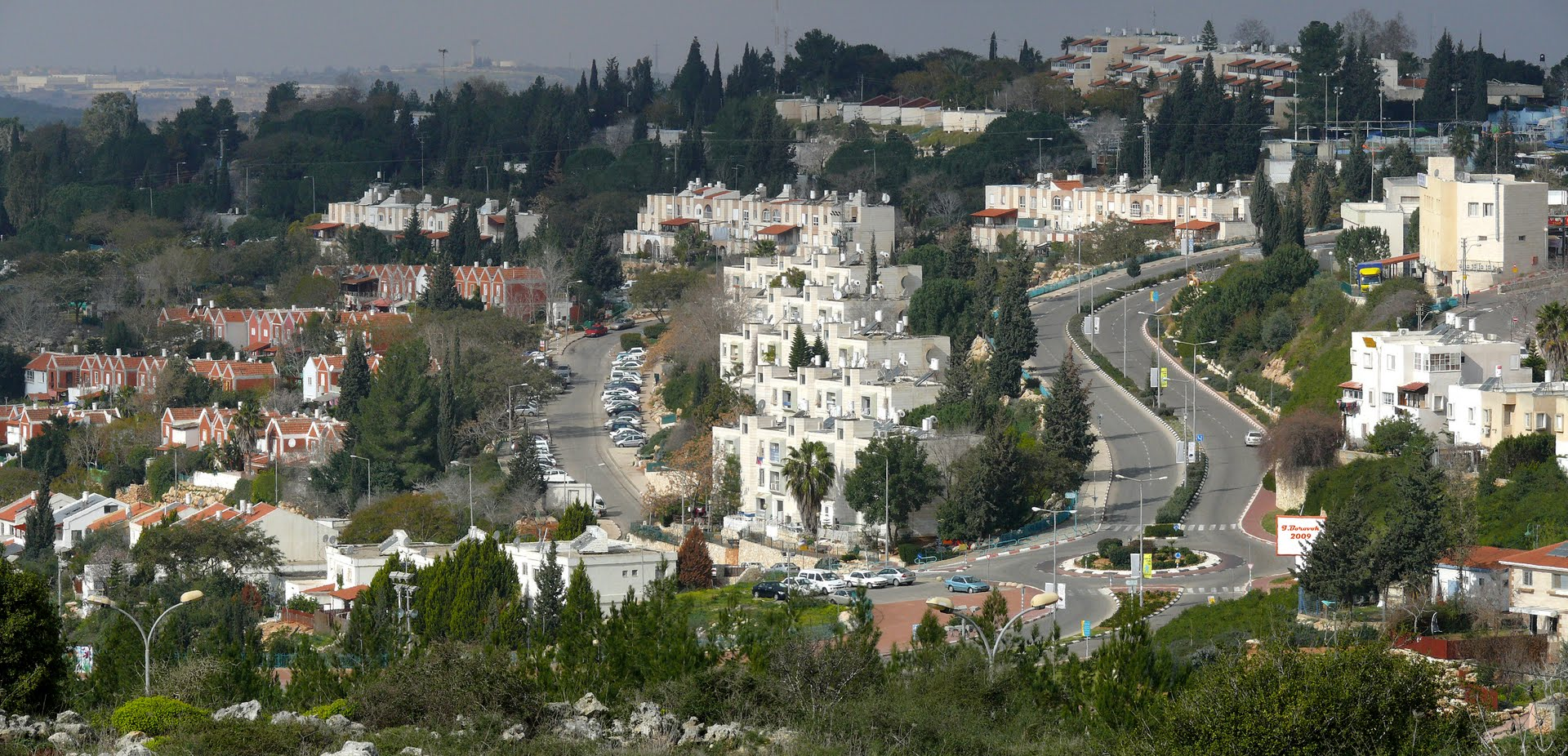 אריאל